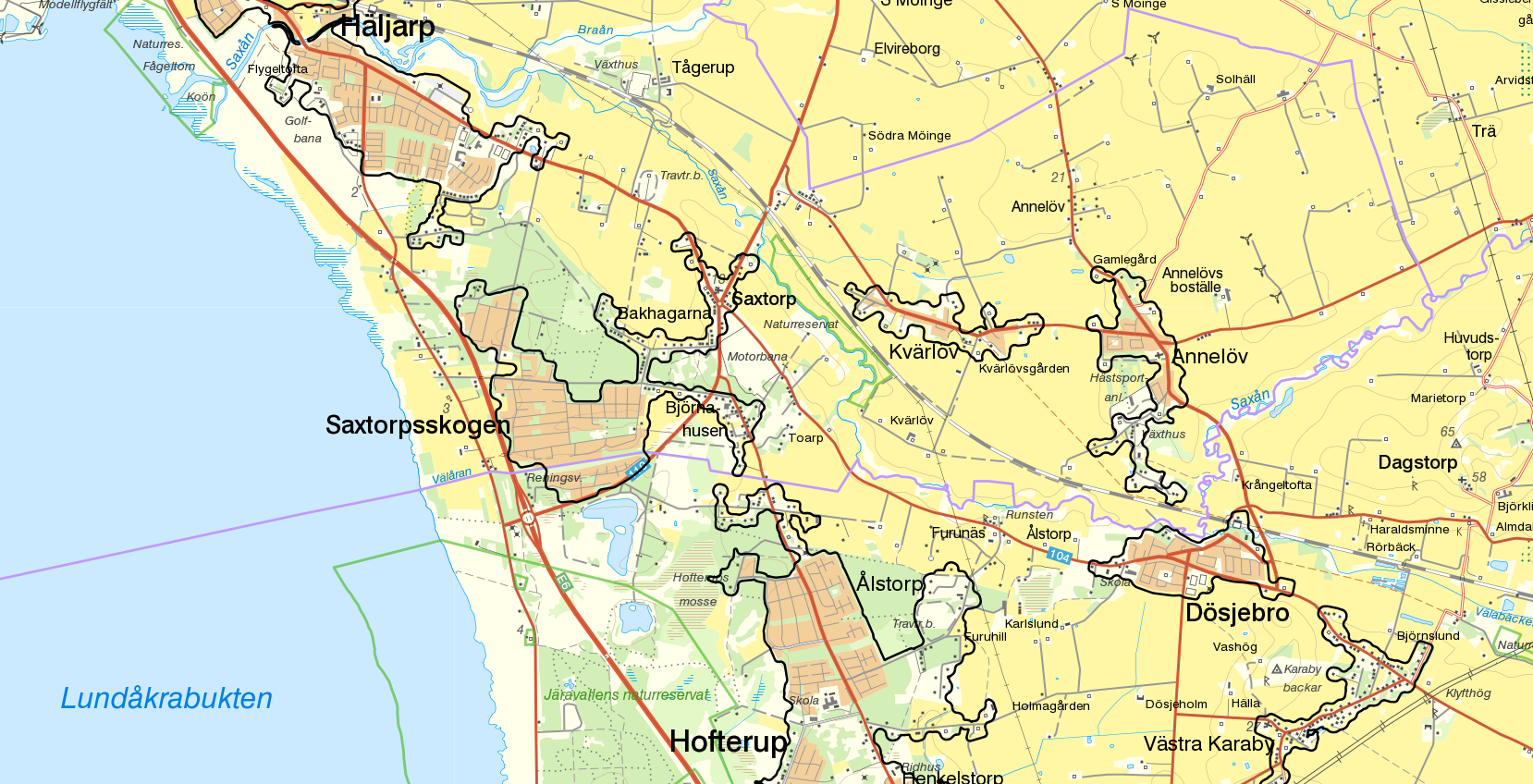 Tätorten Saxtorpsskogen med gränserna från Statistiska centralbyråns tätortsavgränsning 2015 i svart. Bakgrundskarta från Lantmäteriet, skala 1:30 236.